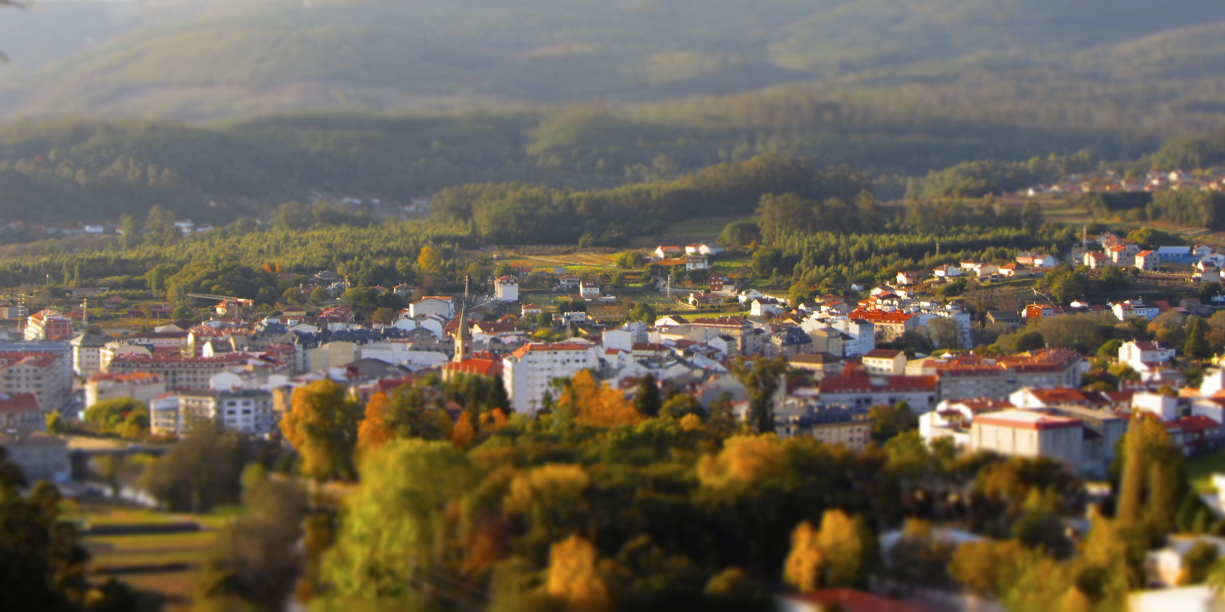 Vista de Caldas de Reis desde o Monte de Santa María